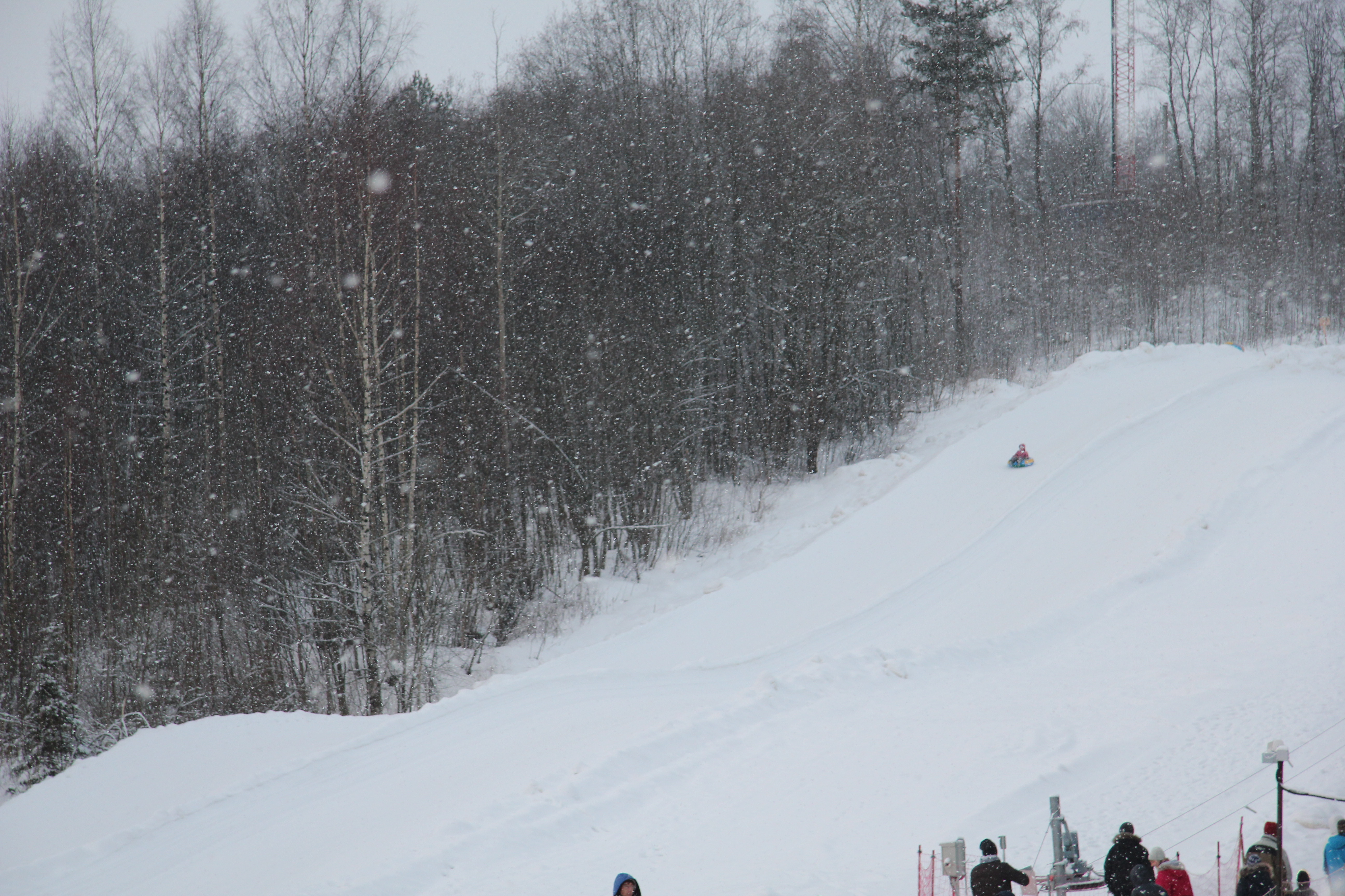 Охта парк